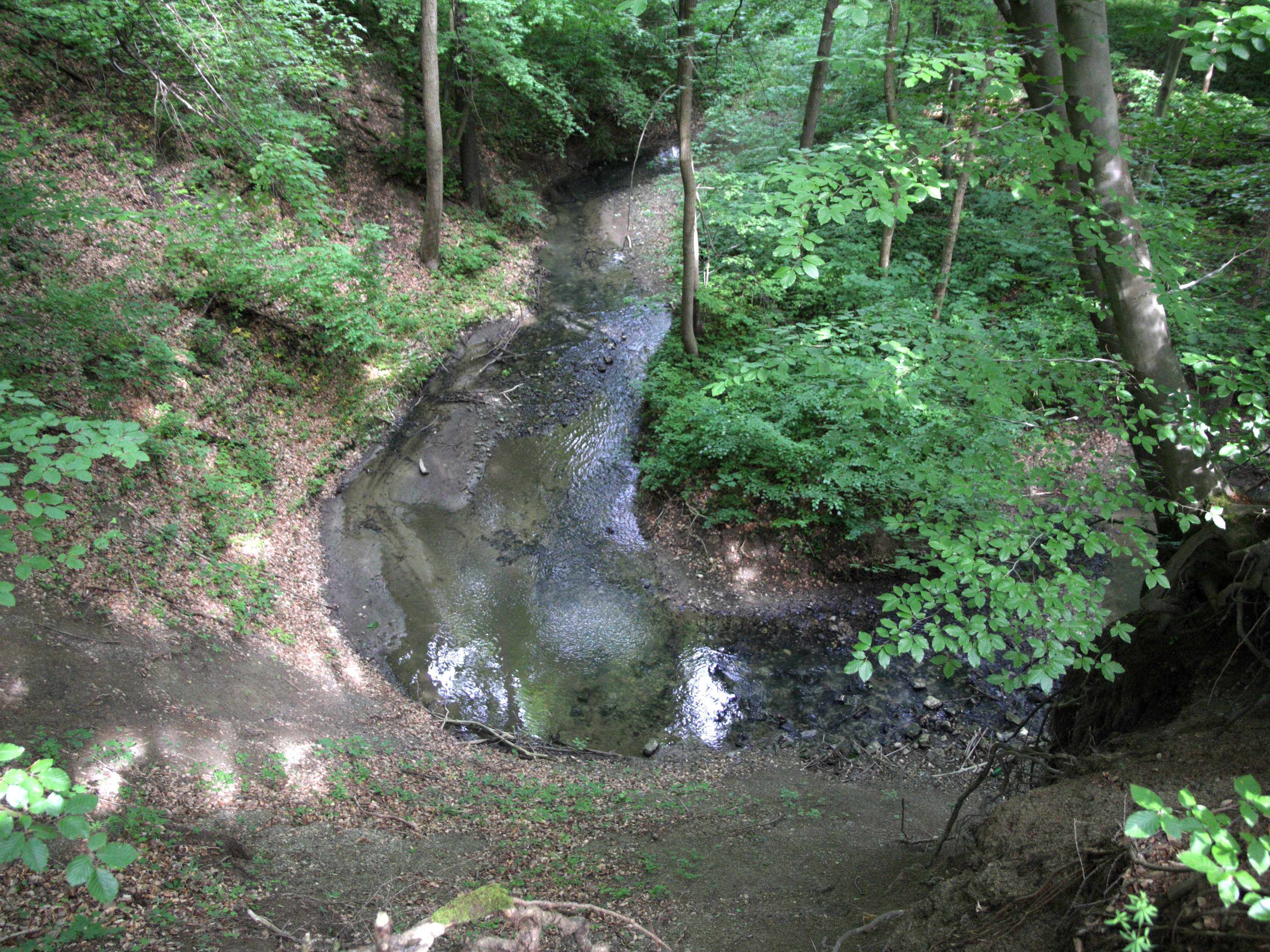 PR Stará Hráz, meandr Kyjovky.